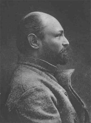 Гершуни Г. А.